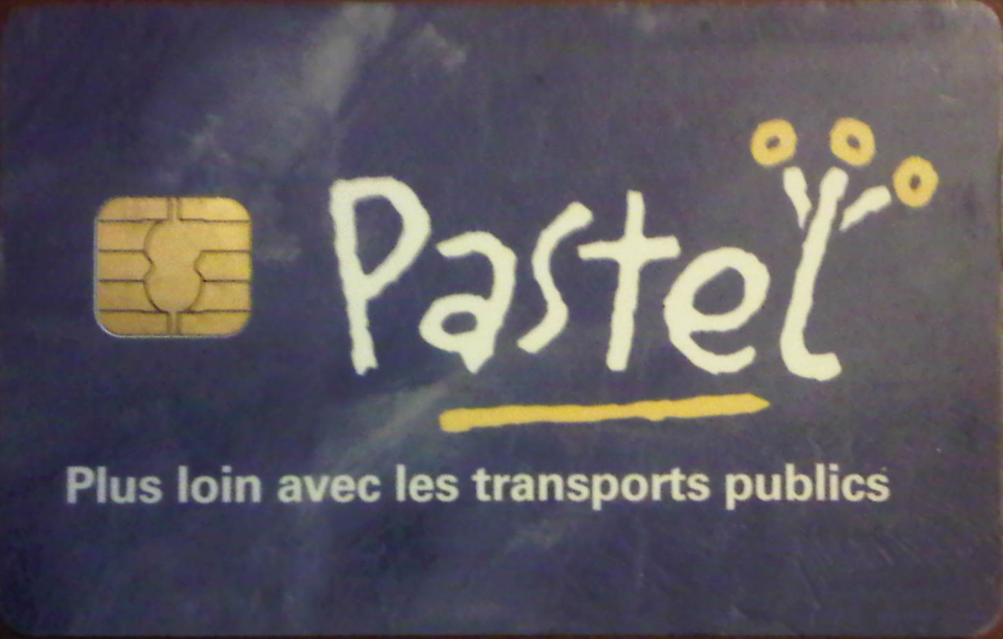 Carte Pastel Tisseo